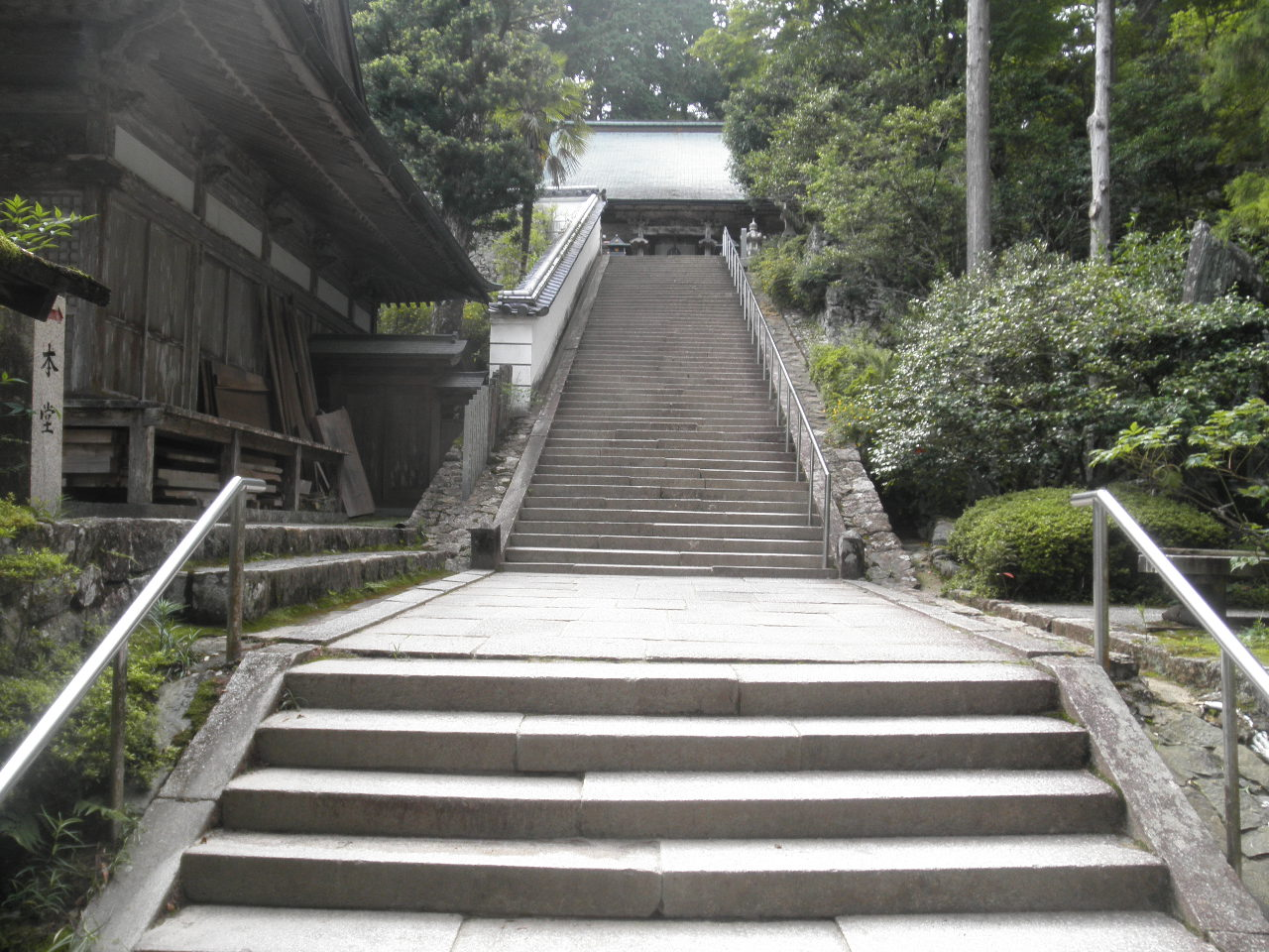 鶴林寺 階段